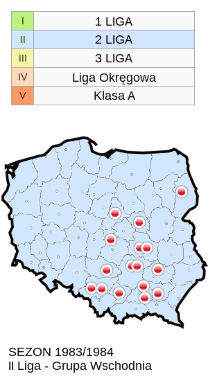 Jagiellonia w sezonie 1983/84 mapa